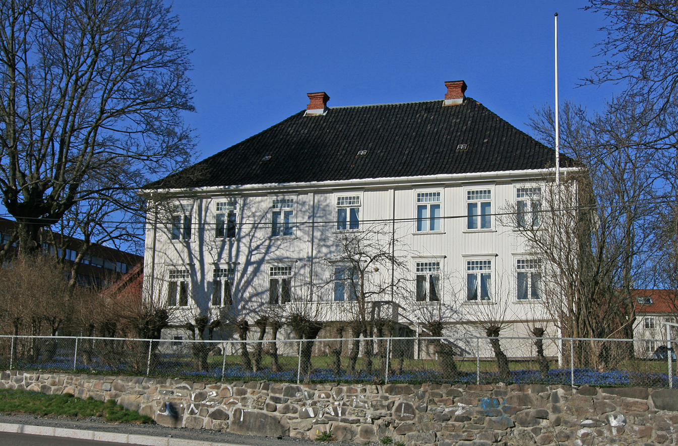 Nedre Blindern gård, Blindernveien 19, Oslo. Oppført mellom 1790 og 1800. Prestegård for Vestre Aker fra 1856. Freda.